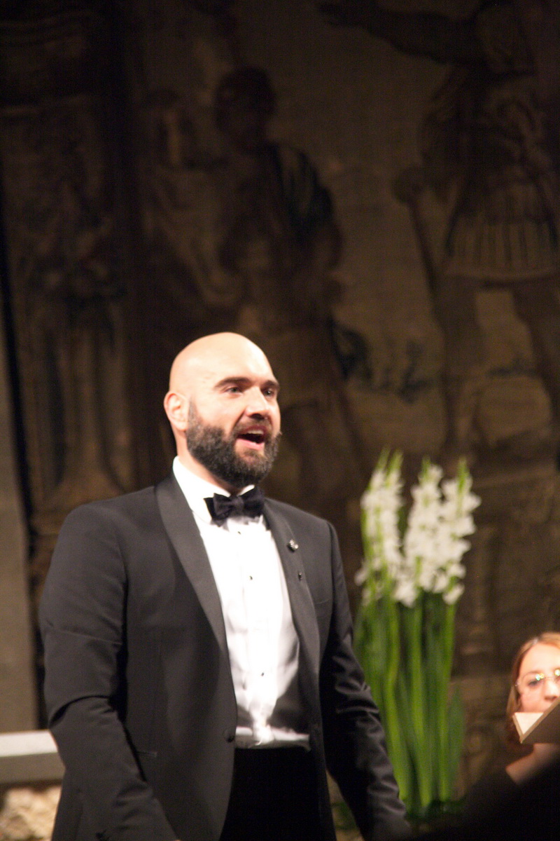 El contratenor Xavier Sabata acompanyat de la Capella Cracoviensis, en l'estrena de "Alexandre el Gran" al Festival de Peralada de 2016